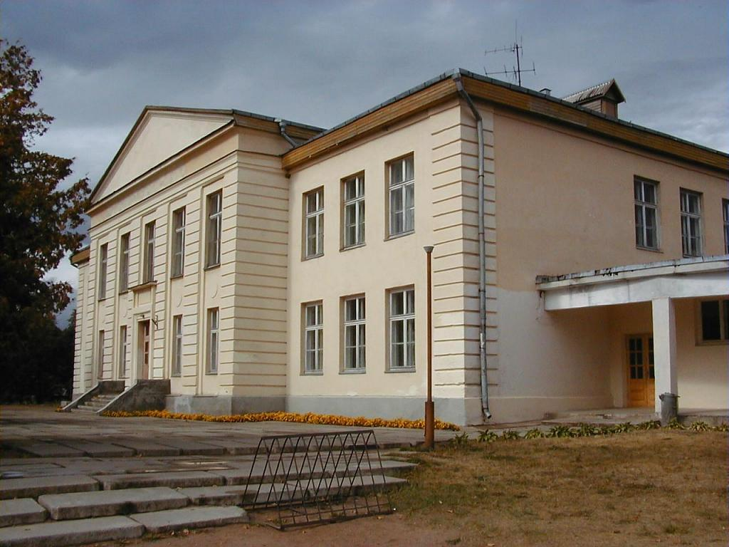 Žīguru skola 2002-09-14